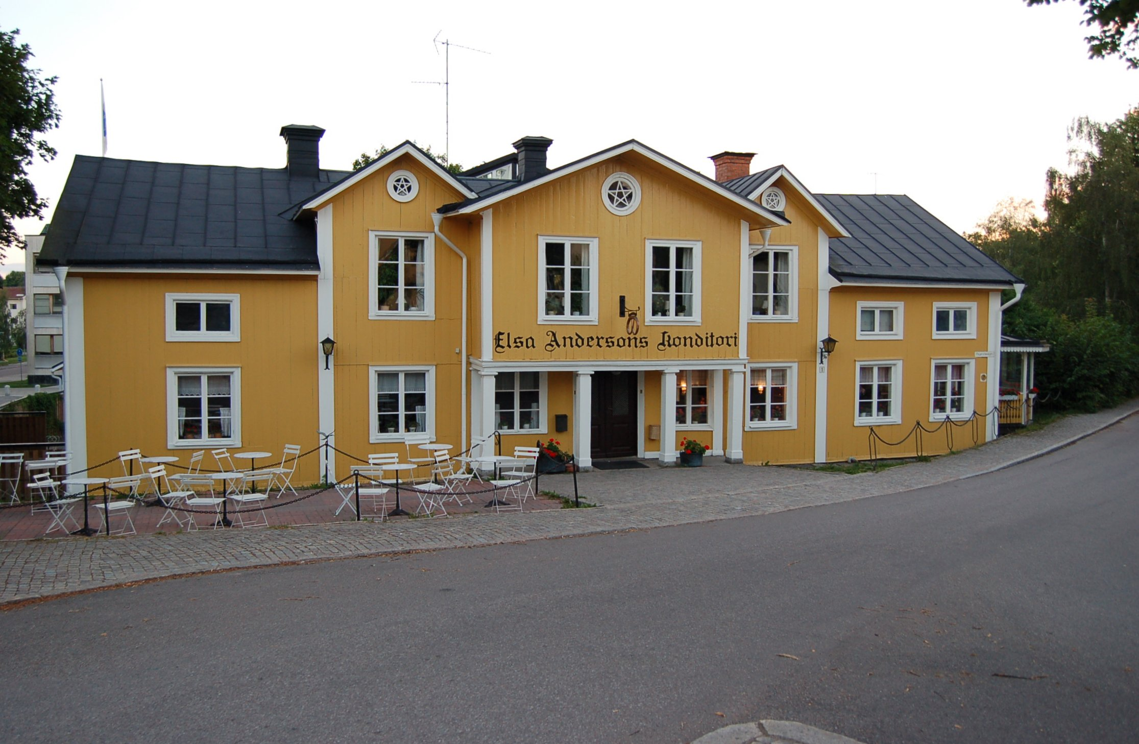 Elsa Andersons konditori i Norberg.